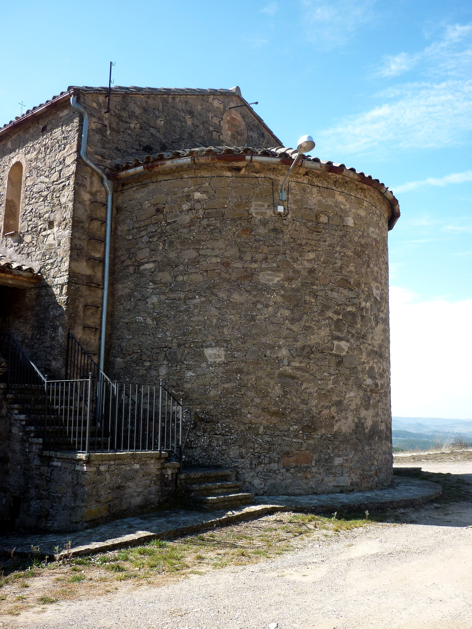 Església parroquial de la Molsosa: absis